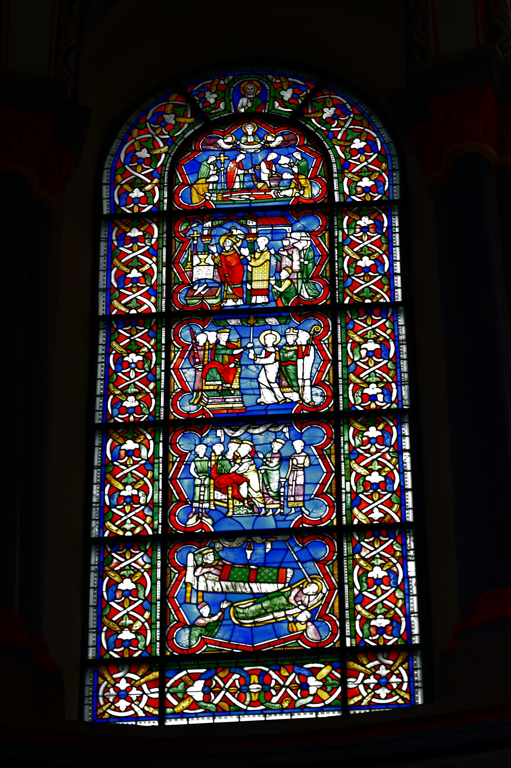 Bleiglasfenster (Kunibertfenster) in der Chorapsis der katholischen Pfarrkirche St. Kunibert in Köln, Darstellung: Szenen aus dem Leben des hl. Kunibert (siehe Werner Schäfke: Kölns romanische Kirchen: Architektur, Kunst, Geschichte, Emons, Köln 2004, S. 115ff., ISBN 3897053217